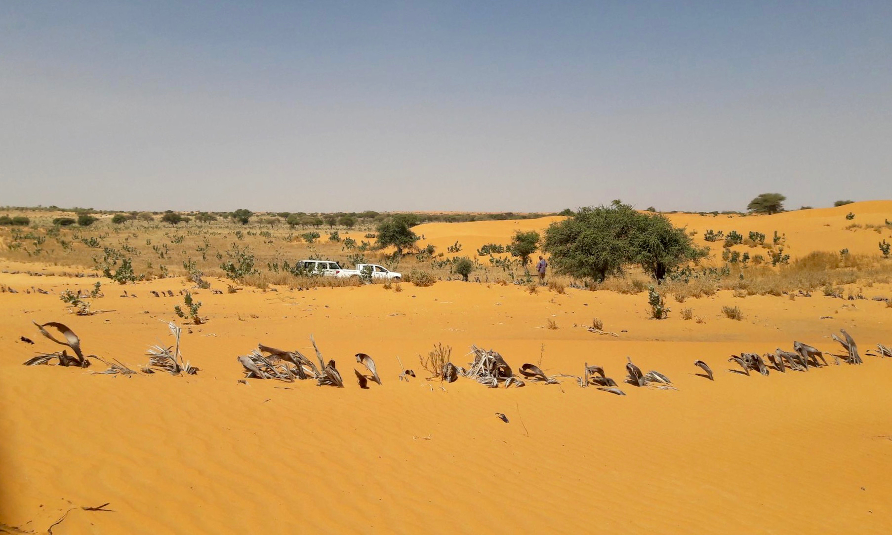 Dünen zwischen dem Weiler Wawouri I und der Nationalstraße 1, Gemeinde Maïné-Soroa, Niger.